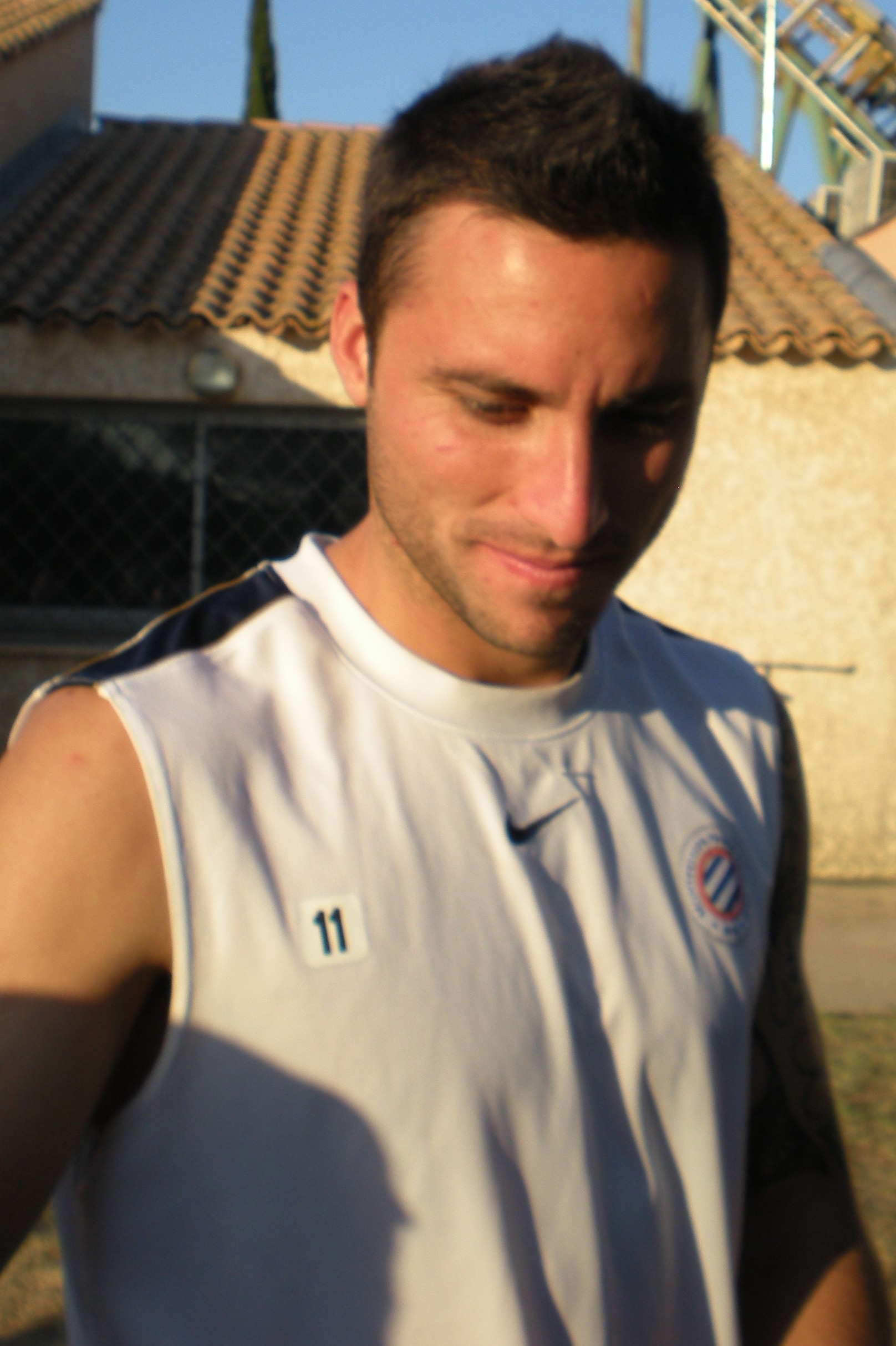 Emanuel Herrera signe des autographes.